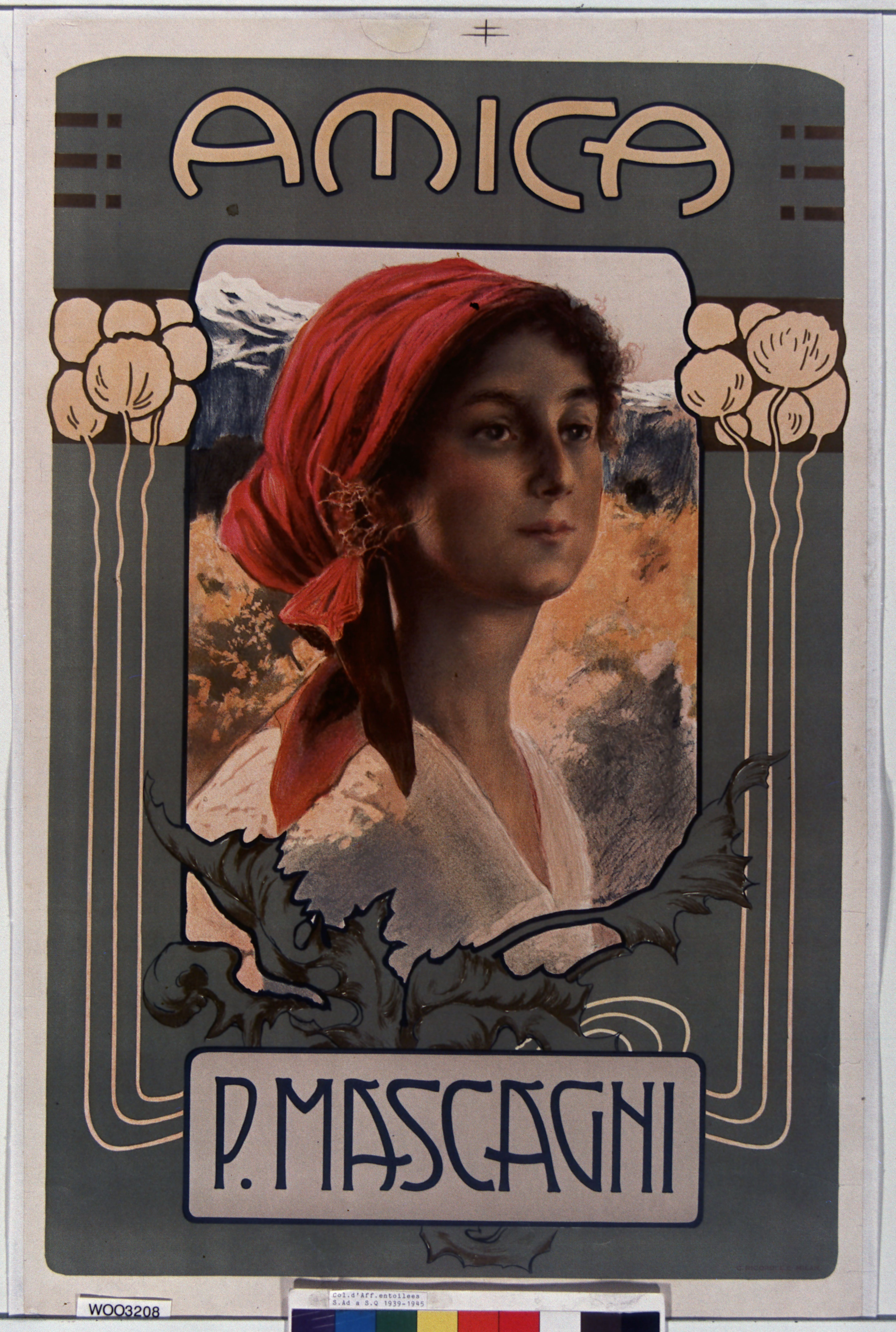 Amica. P. Mascagni : affiche / [non identifié]